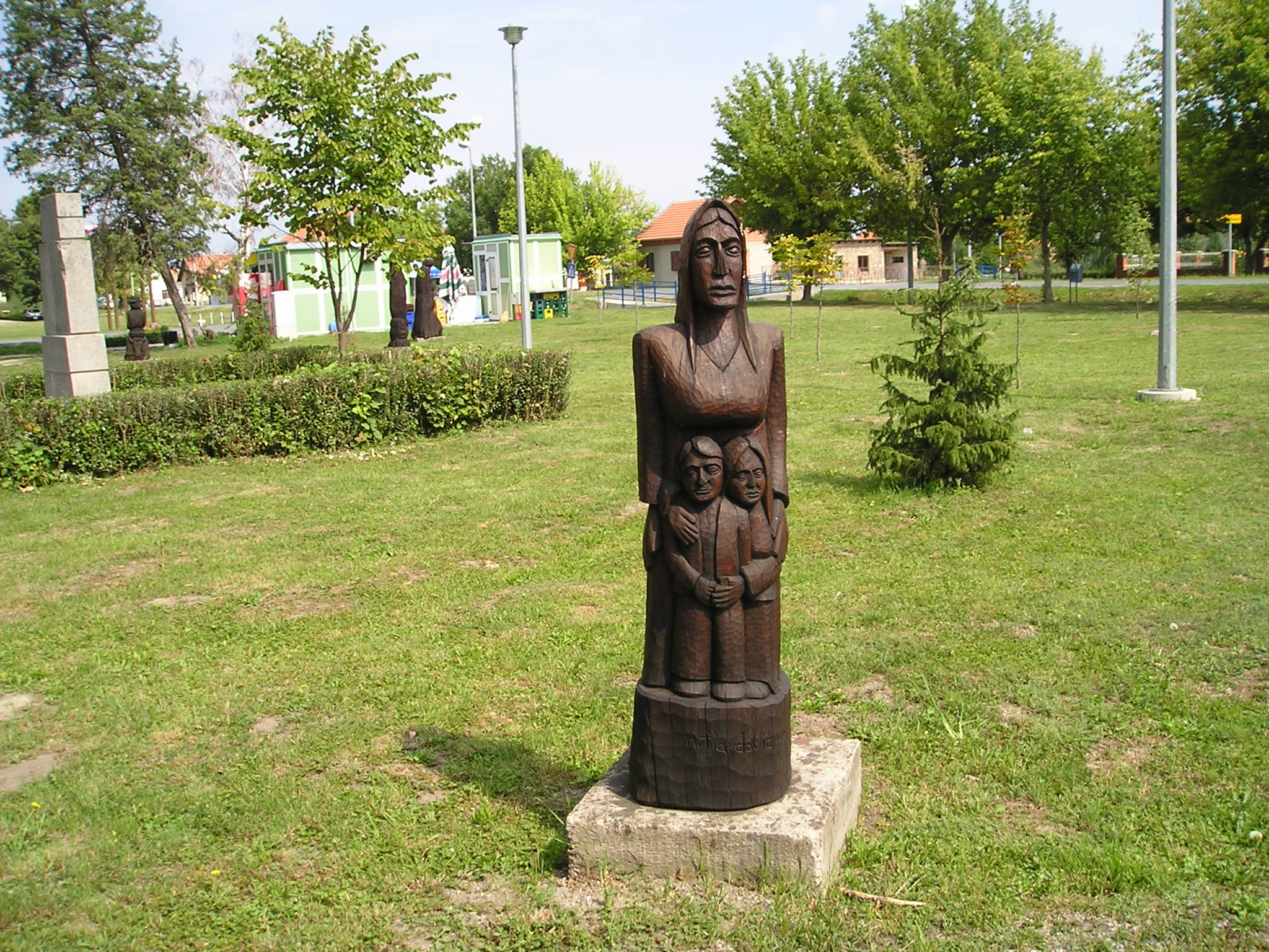 Naive art in Ernestinovo (near Osijek), Croatia